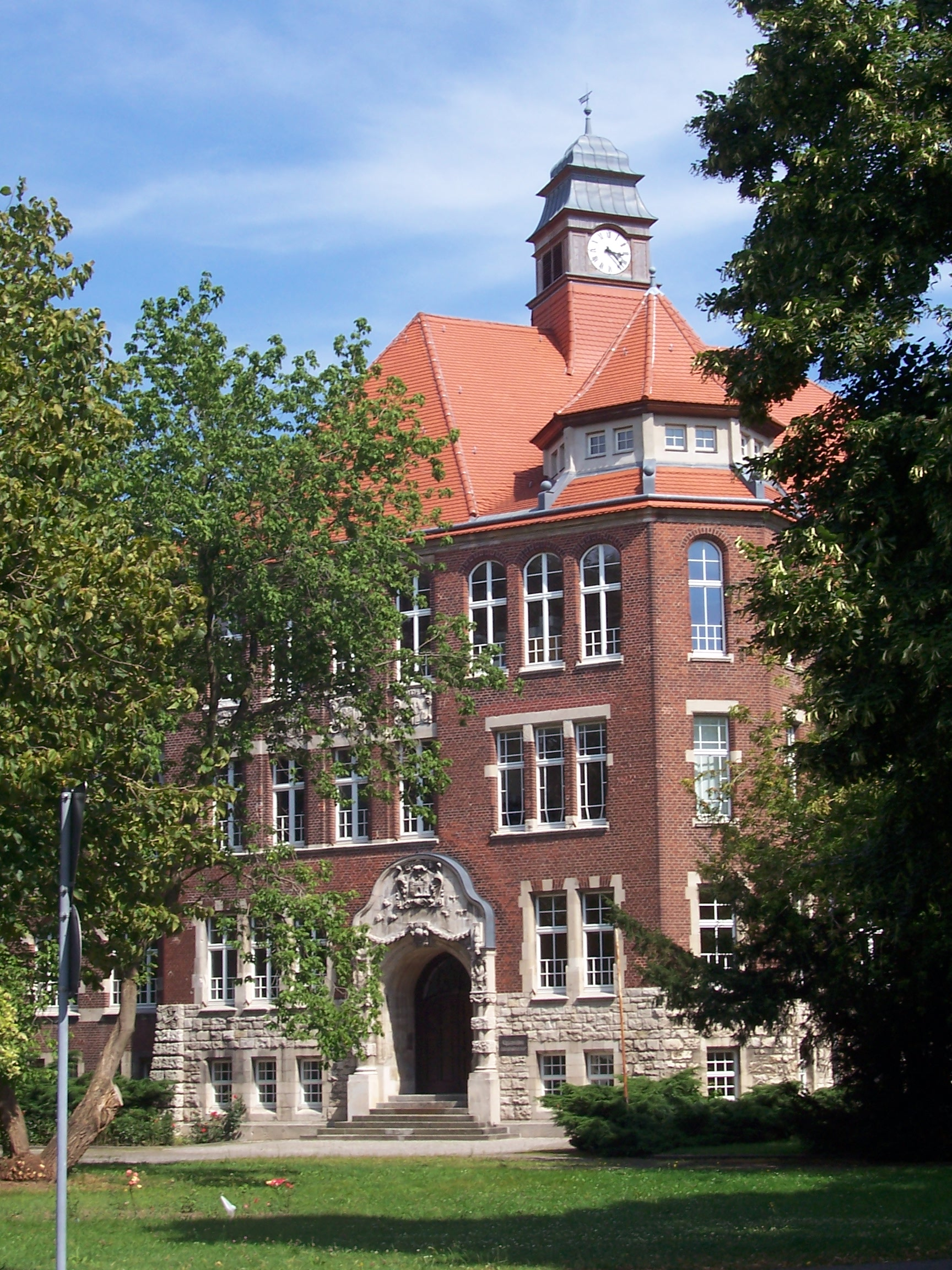 Martin-Rinckart-Gymnasium Eilenburg